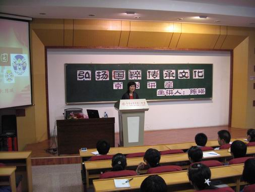 乌鲁木齐市第一中学 国学社 校园文化周 京剧课